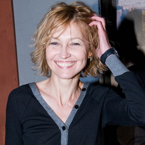 Ингеборга Дапкунайте на премьере фильма «Чёрная молния» в киноцентре «Октябрь» 21 декабря 2009 года